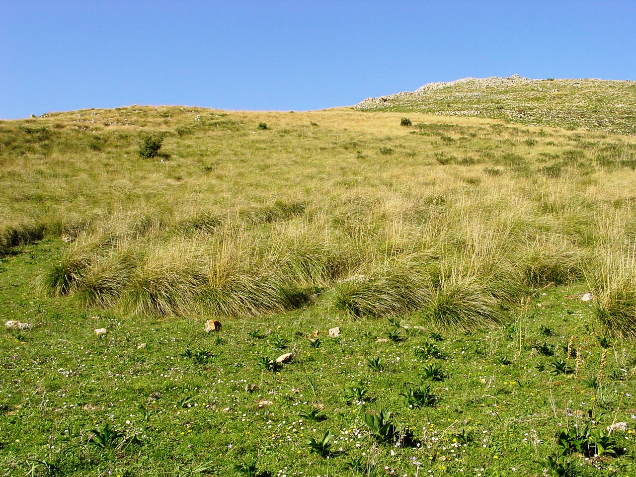 Riserva naturale dello Zingaro, Sicily Ampelodesmos mauritanicus